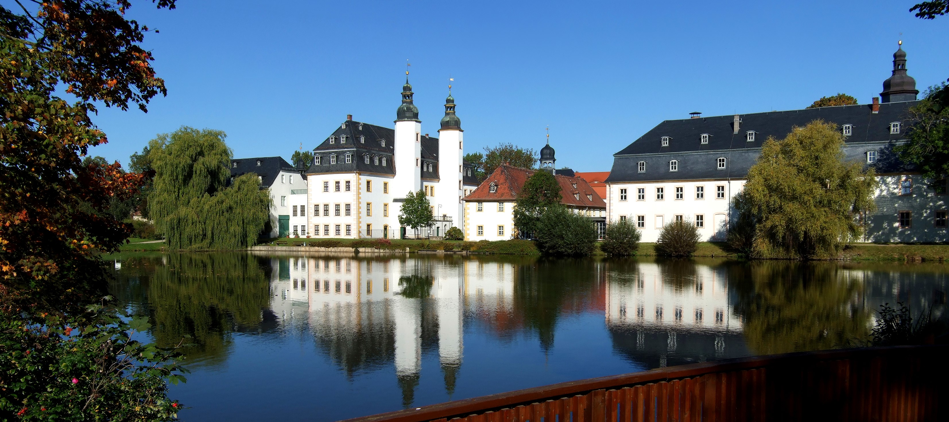 Schloss Blankenhain bei Crimmitschau, Deutsches Landwirtschaftsmuseum